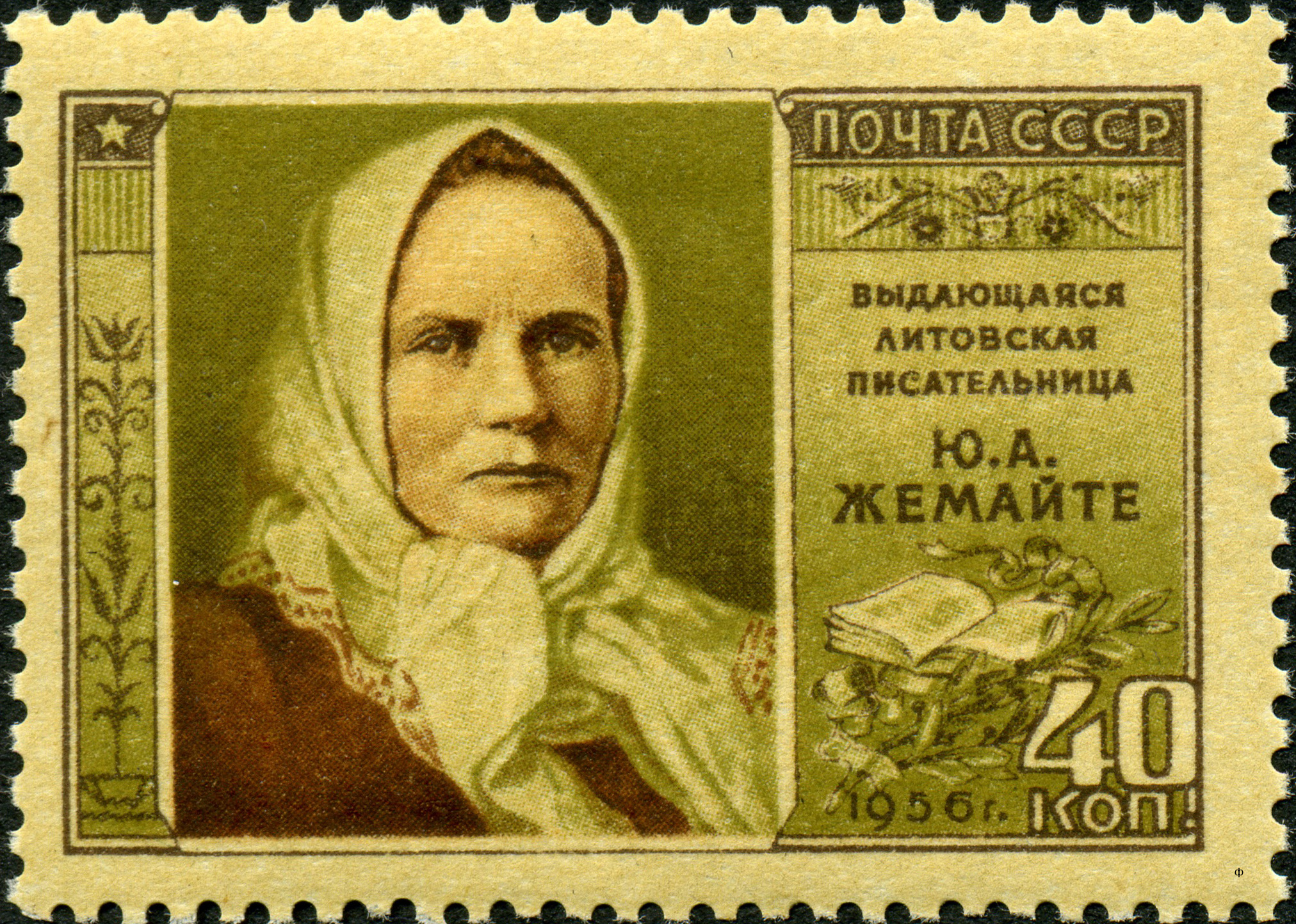 Почтовая марка СССР из серии «Писатели нашей Родины», выпущенная в 1956 году. На марке изображена литовская писательница и общественный деятель Юлия Жемайте. Художник — П. Чернышев. Номер по каталогу ЦФА — 1930. Тираж — 1 млн экз.